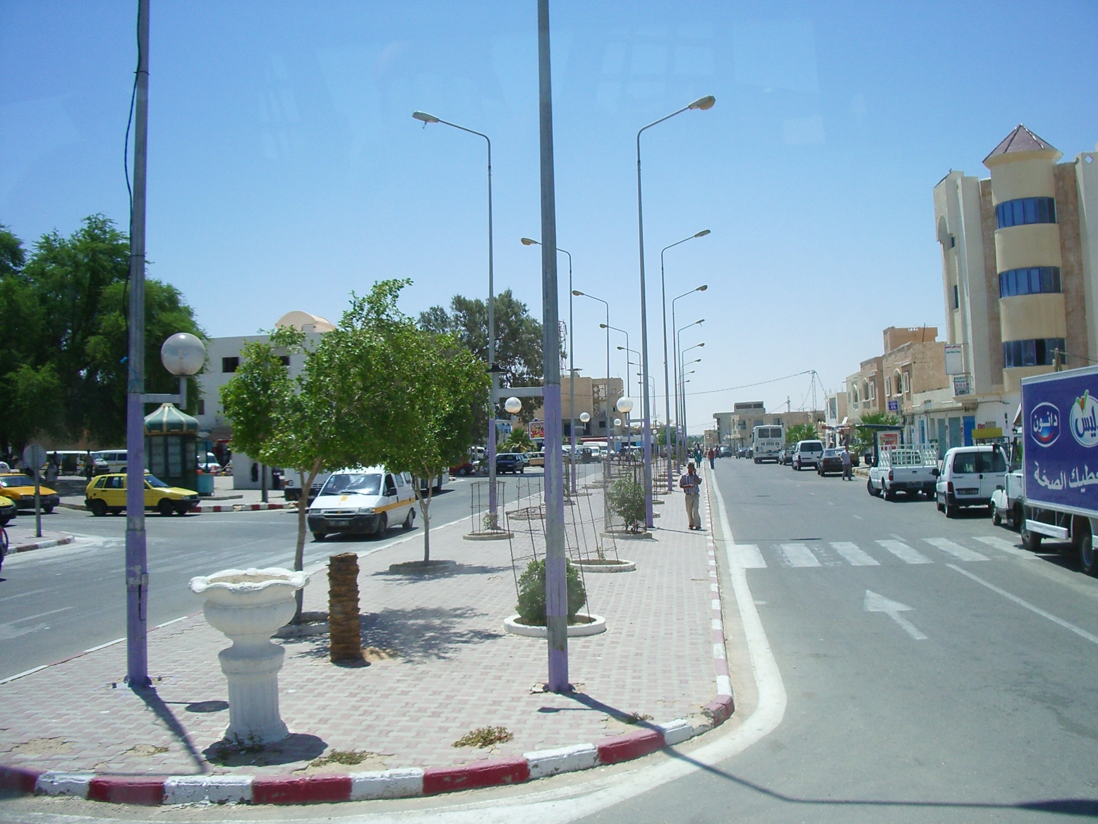 Carrer de Kébili